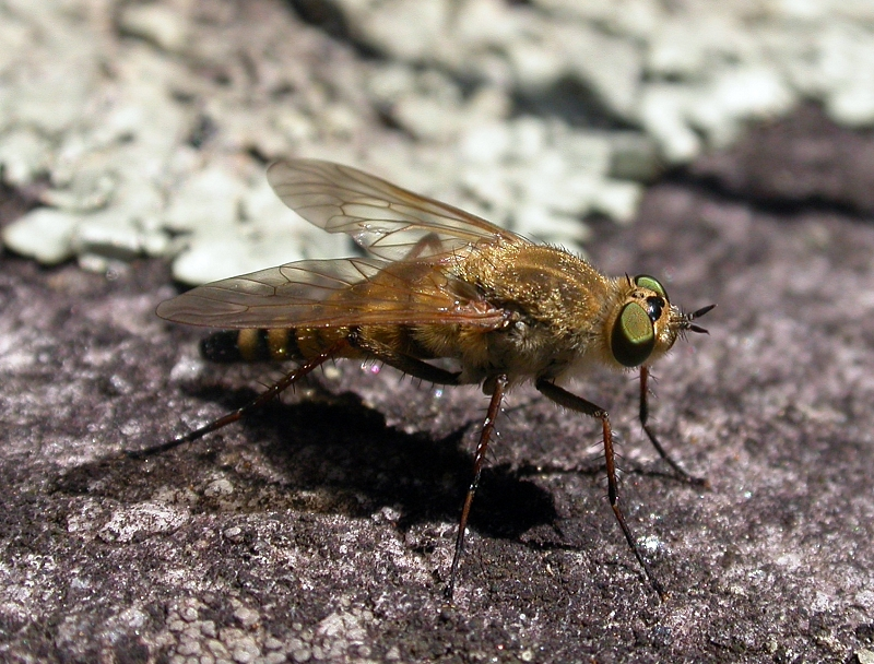 Stilettfliege, Thereva spec., female, Therevidae, Maggia Tal, Locarno, Swizzerland